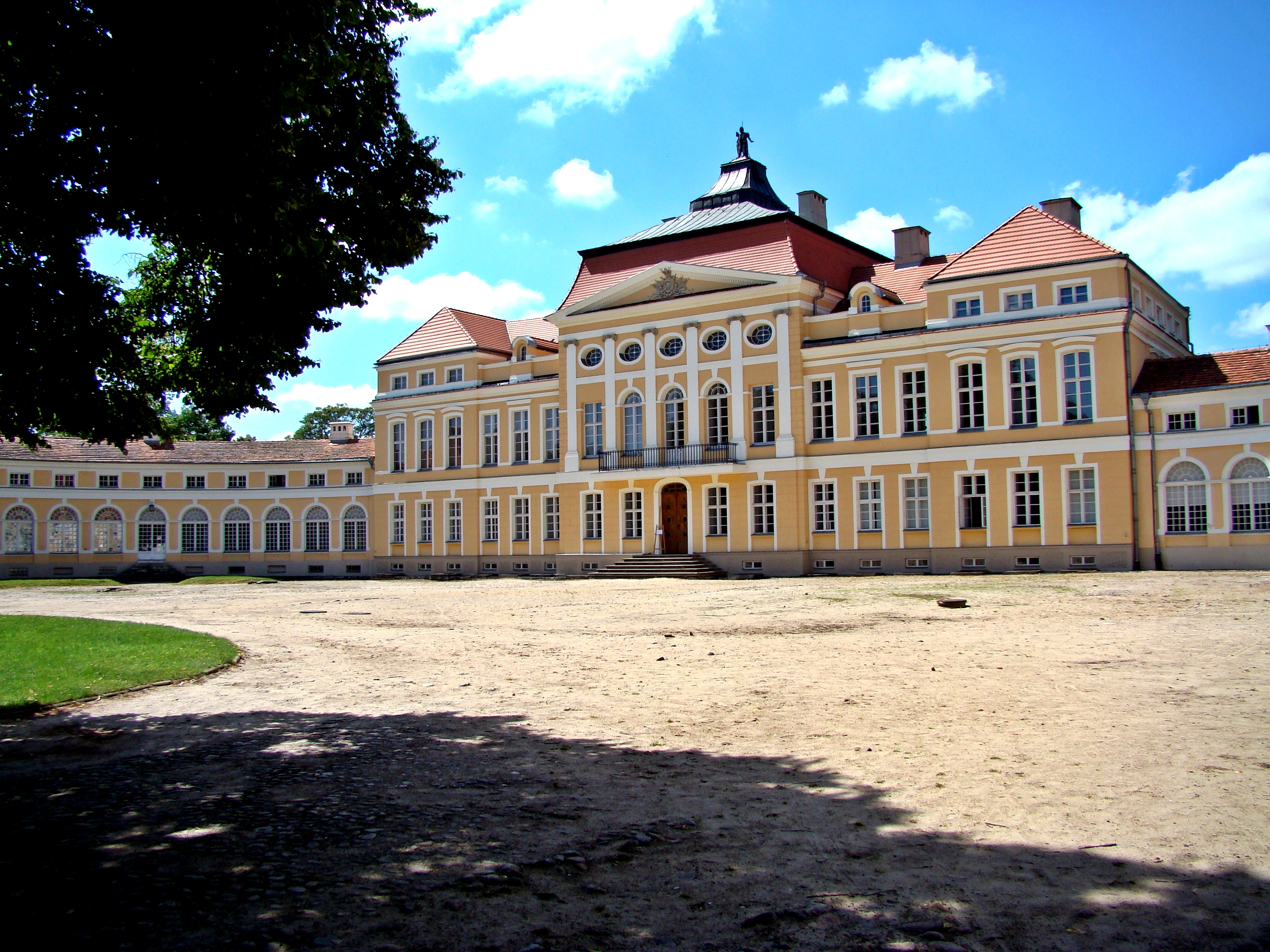 Rogalin, zespół pałacowy, XVIII, XIX